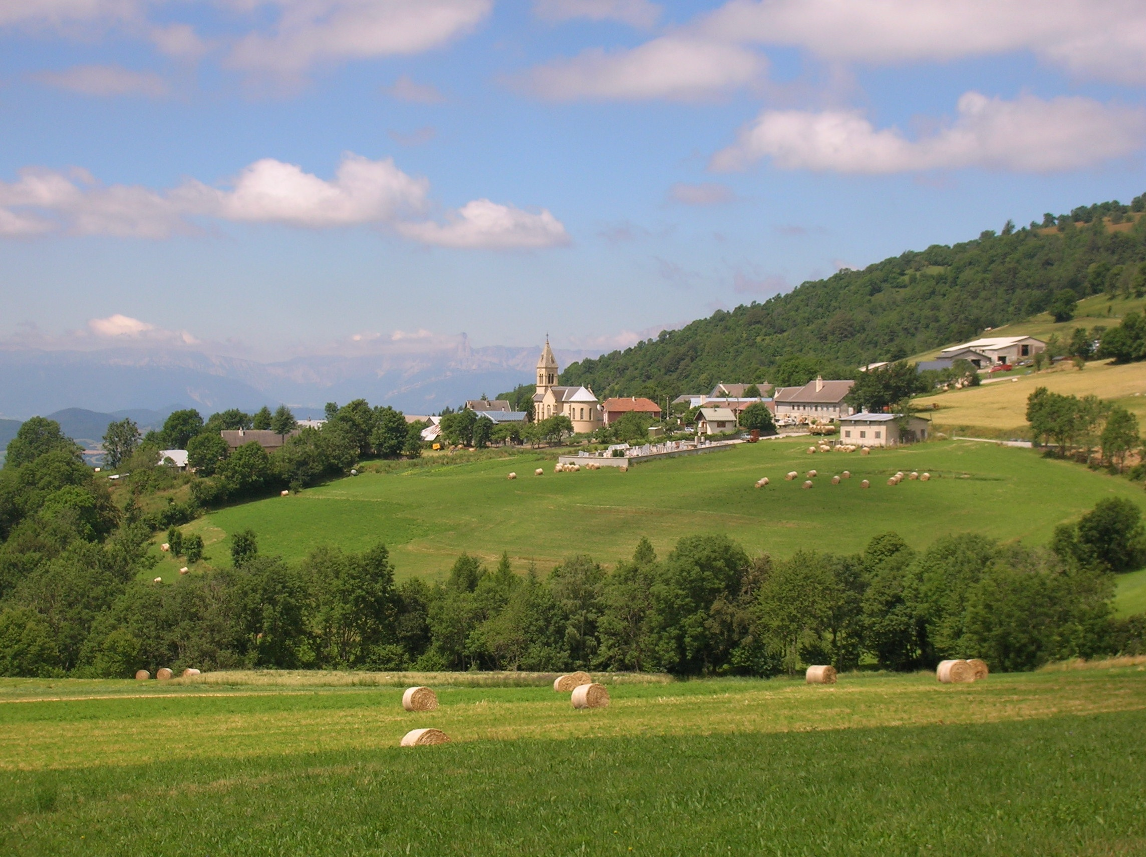 Saint-Michel-en-Beaumont, Isère, France.